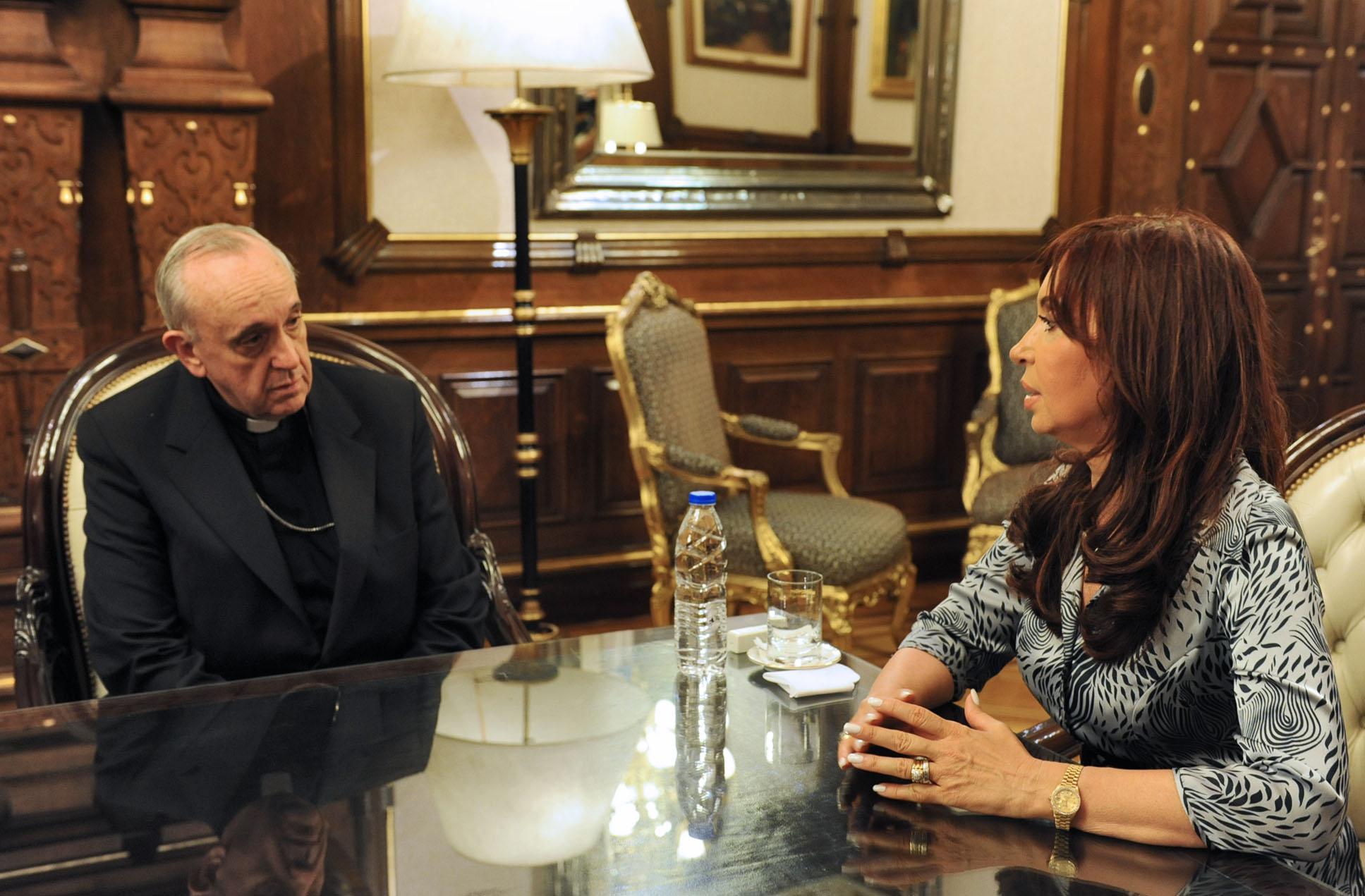 Reunión con la cúpula de la Conferencia Episcopal Argentina